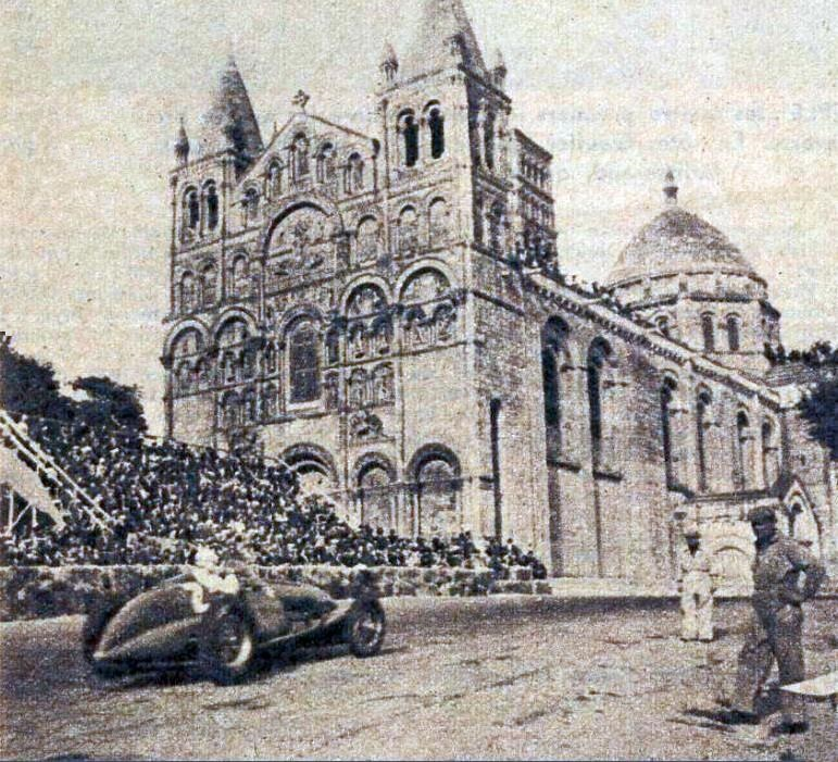 Raymond Sommer sur Alfa Romeo 308, vainqueur du premier Circuit des Remparts d'Angoulême 1939, devant la cathédrale Saint-Pierre.